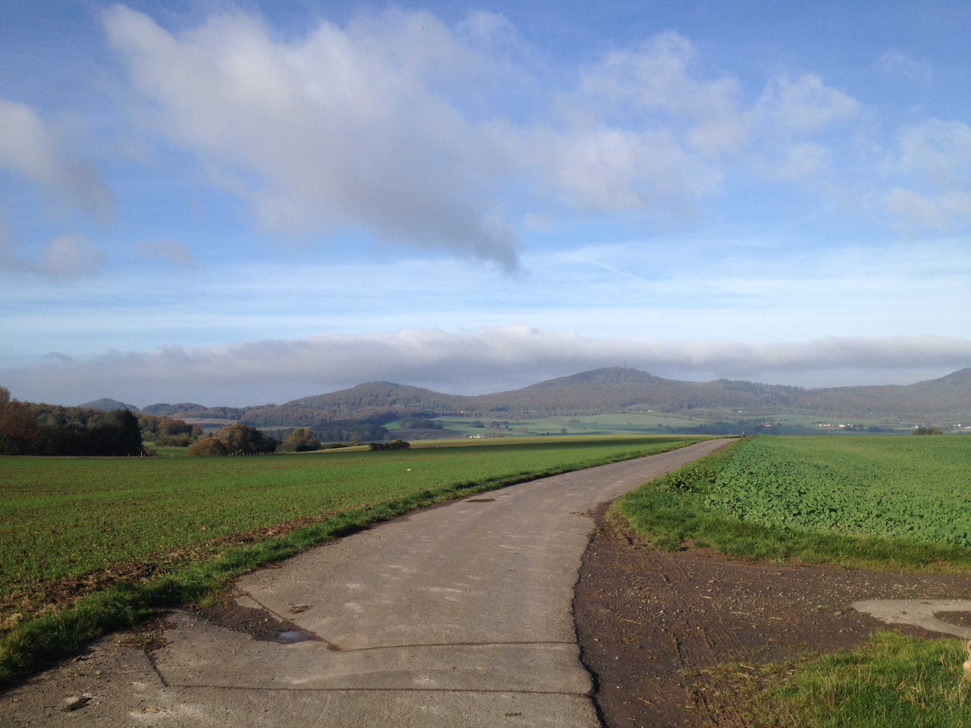 Der Breite Weg westlich von Dörnberg, einem Ortsteil der Gemeinde Habichtswald. Über den Breiten Weg verlaufen der Eco Pfad Kulturgeschichte Habichtswald und der Kassel-Edersee-Radweg.